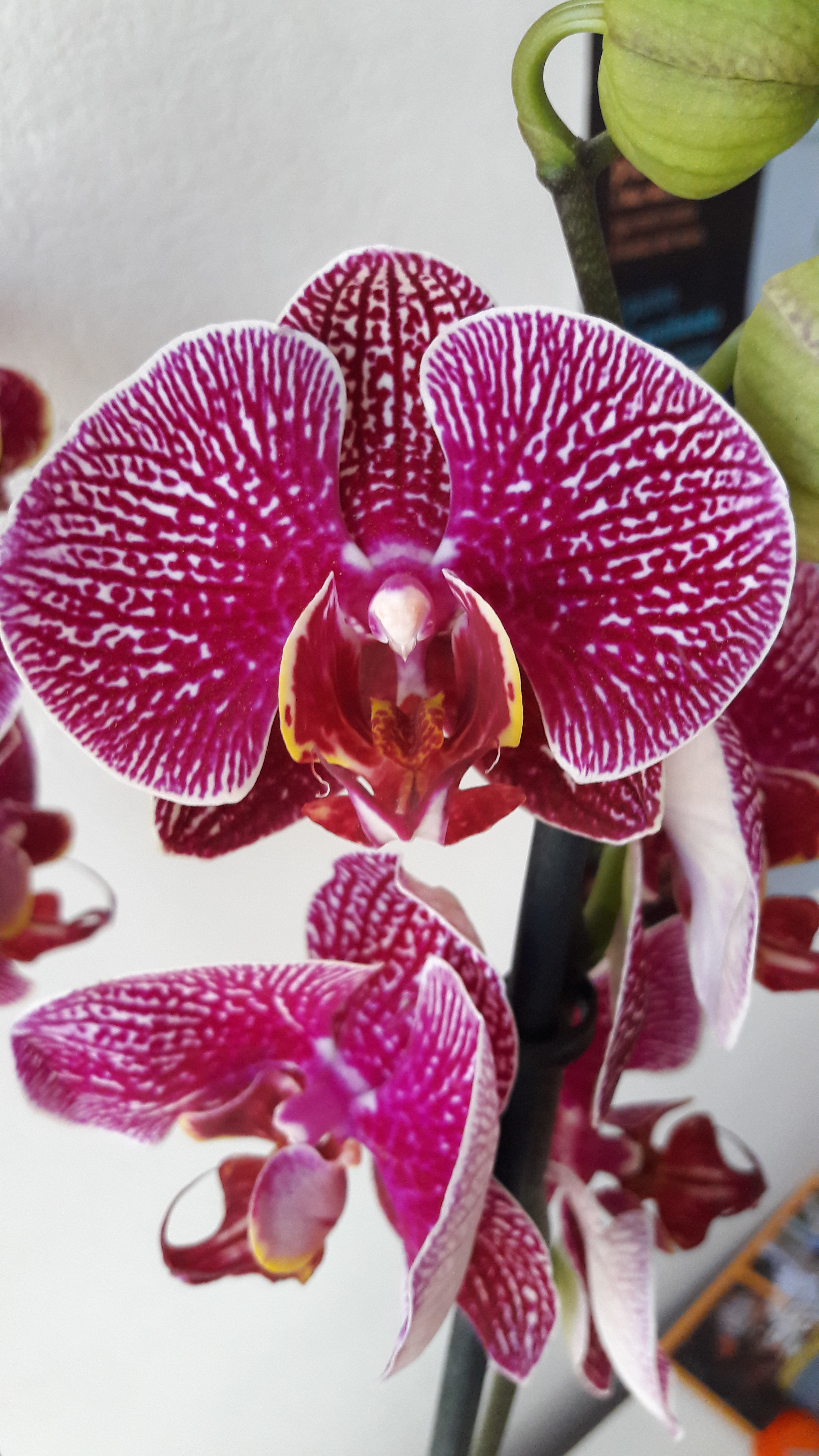 Phalaenopsis